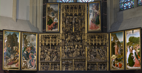 Sint-Antoniuskapel, altaar, 15e, Antwerpse school